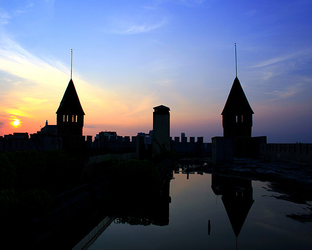 Quinlan Castle, Birmingham, Alabama